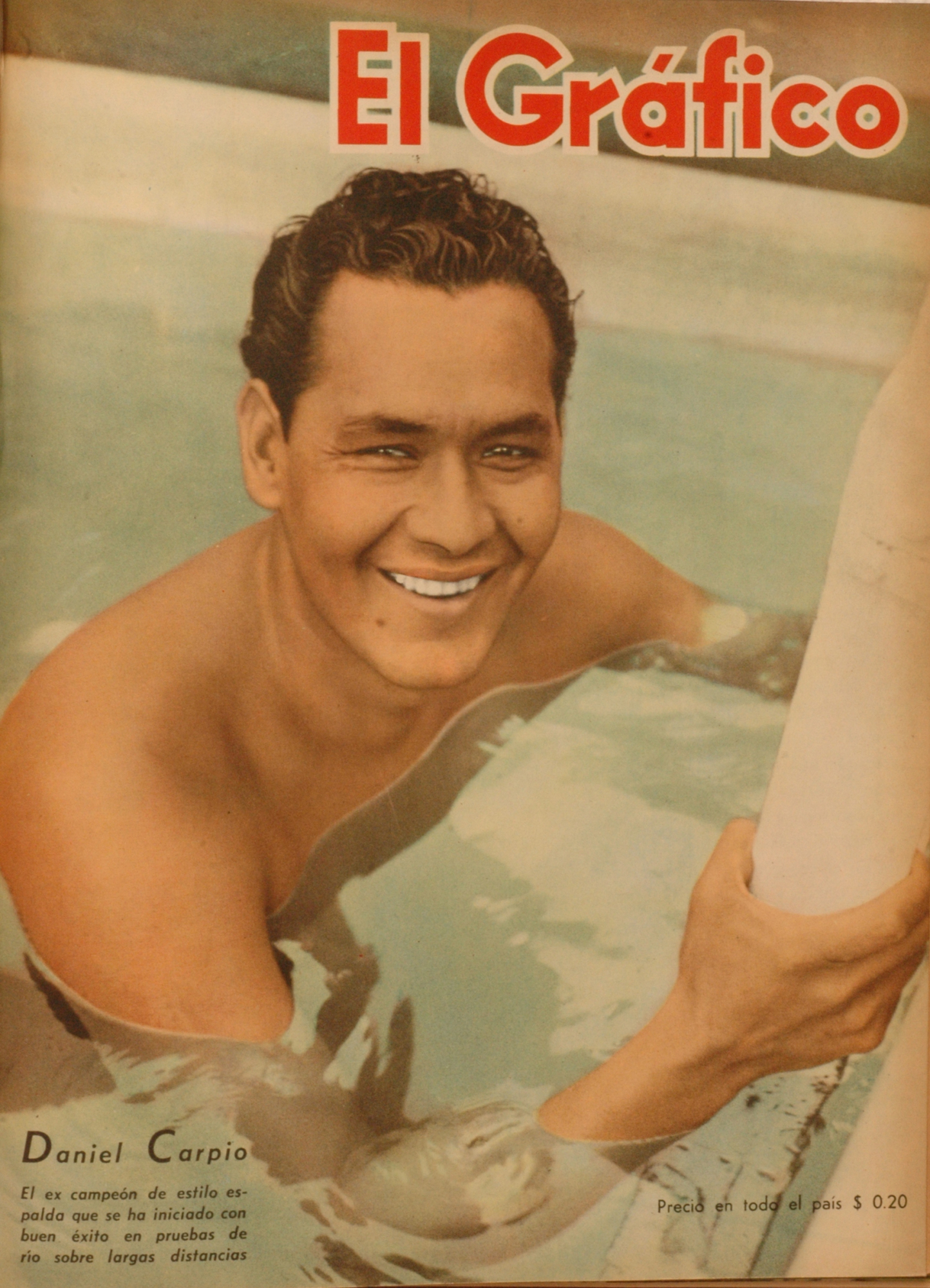 El Grafico del 19 de Enero de 1945. Edicion 1332